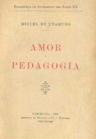 Portada de la primera edición de la novela de Miguel de Unamuno "Amor y pedagogía". 1902. Henrich y Ca.